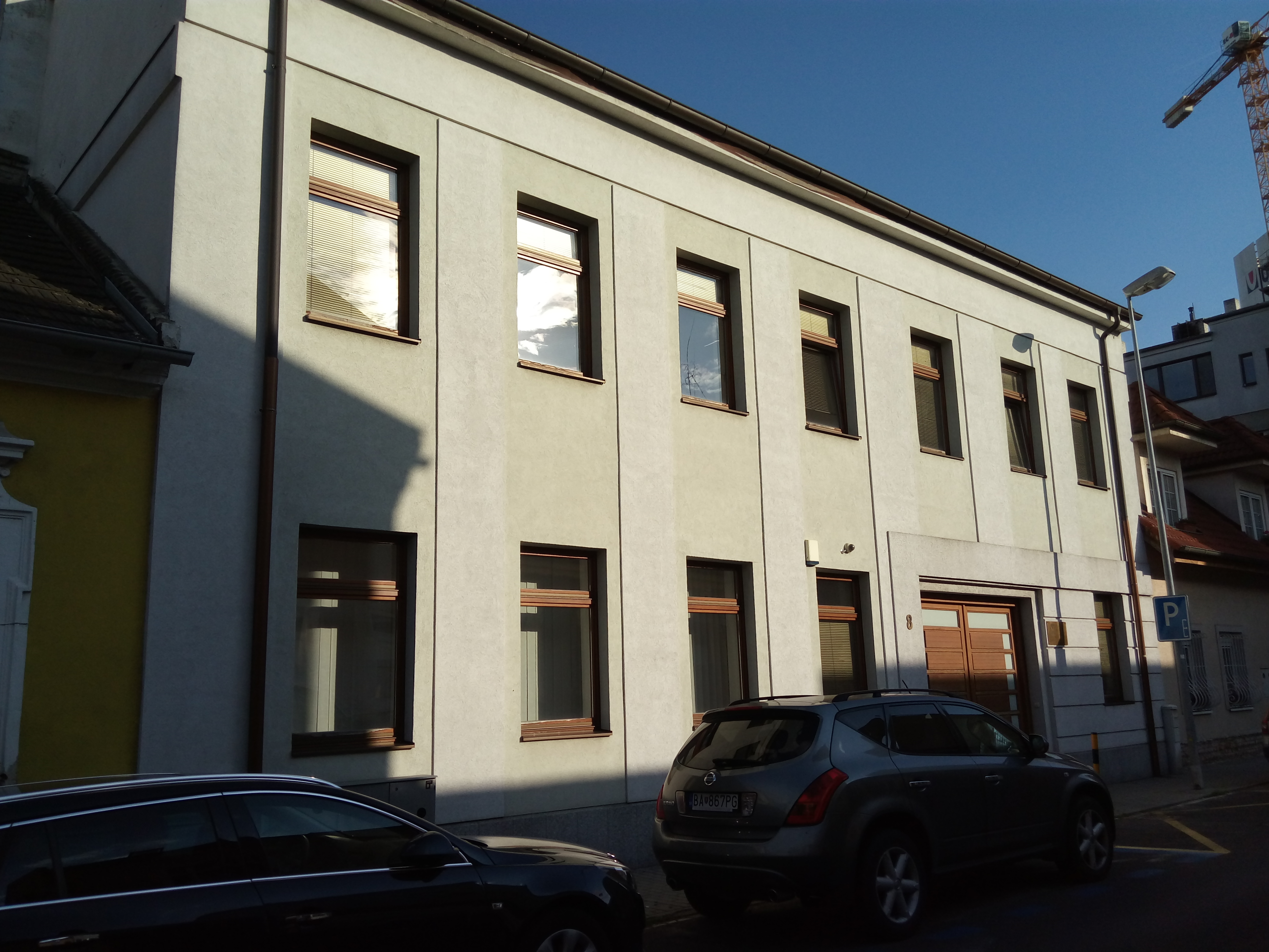 Čajakova, Nové Mesto, Bratislava